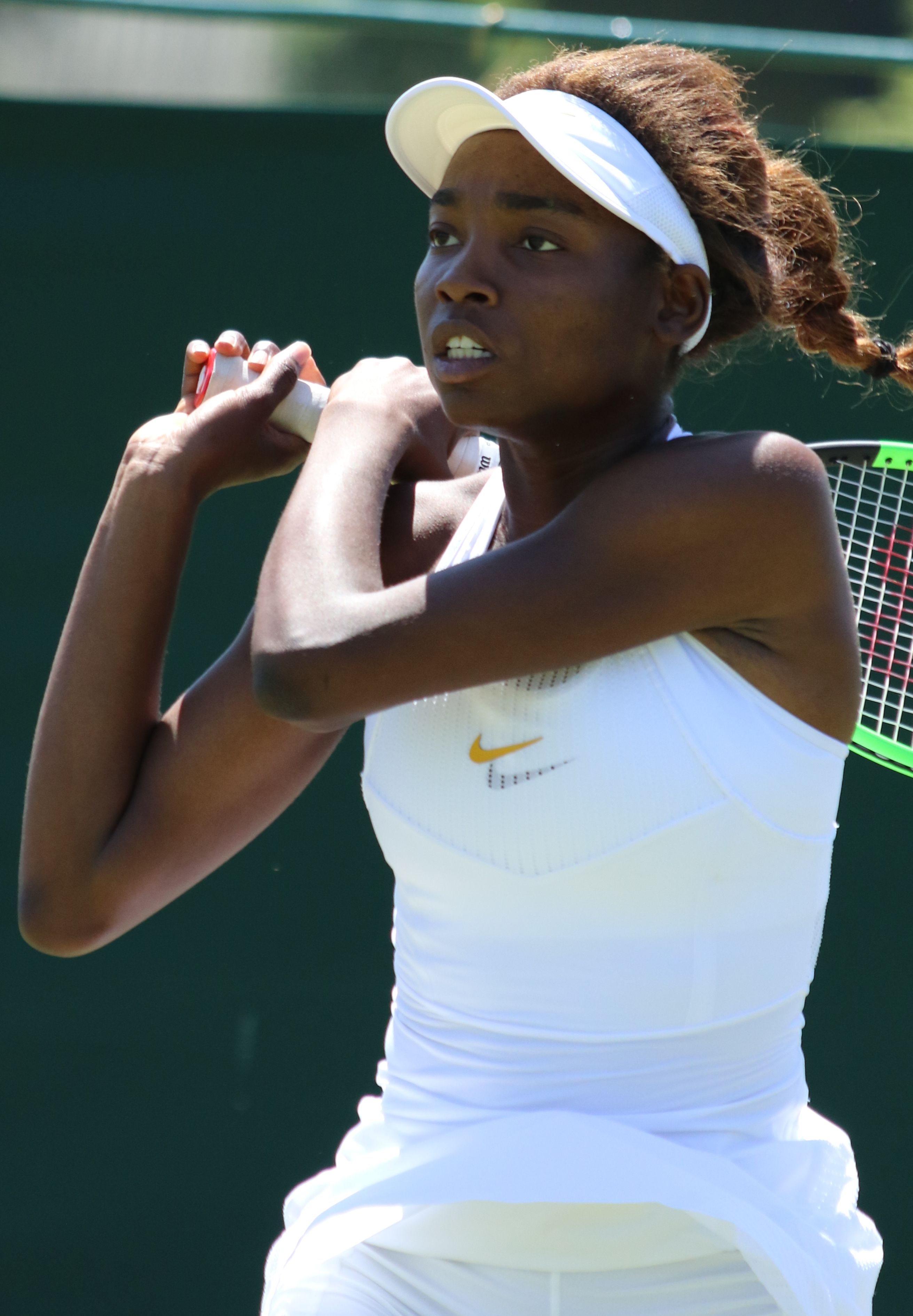 Abanda WMQ18 (1)